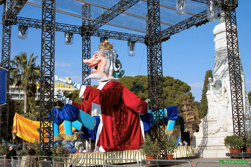 Un char de carnaval exposé à Nice.